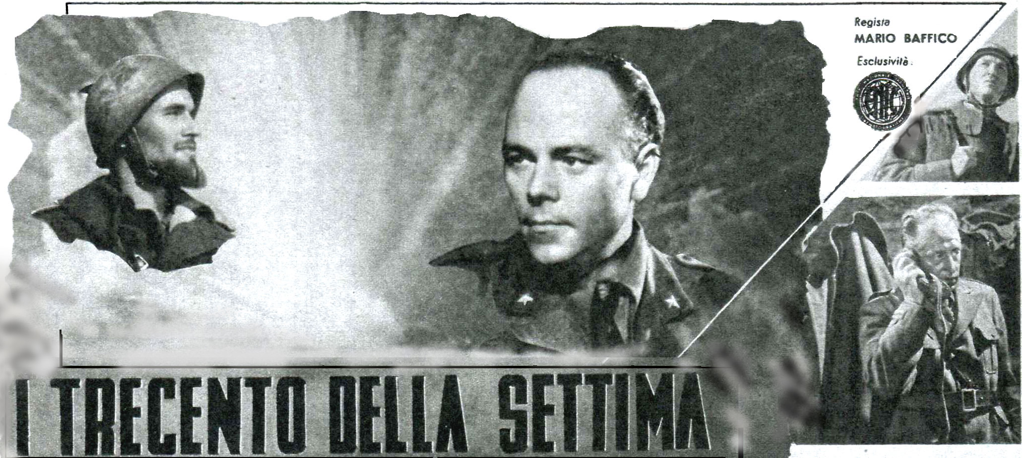 "I trecento della settima" (Baffico, 1943) - promo